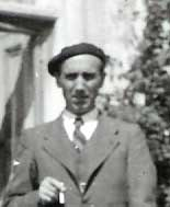 Emile Schaus (1948)